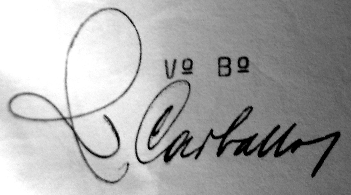 Visto e prace de Carballo Calero nun documento